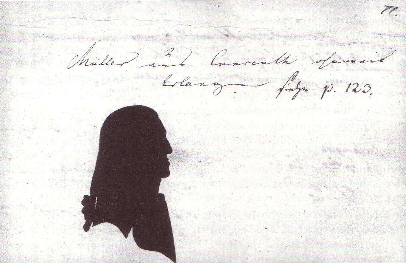 Silhouette und Stammbucheintrag des Harmonistenseniors und späteren weimarischen Kanzlers Friedrich (von) Müller